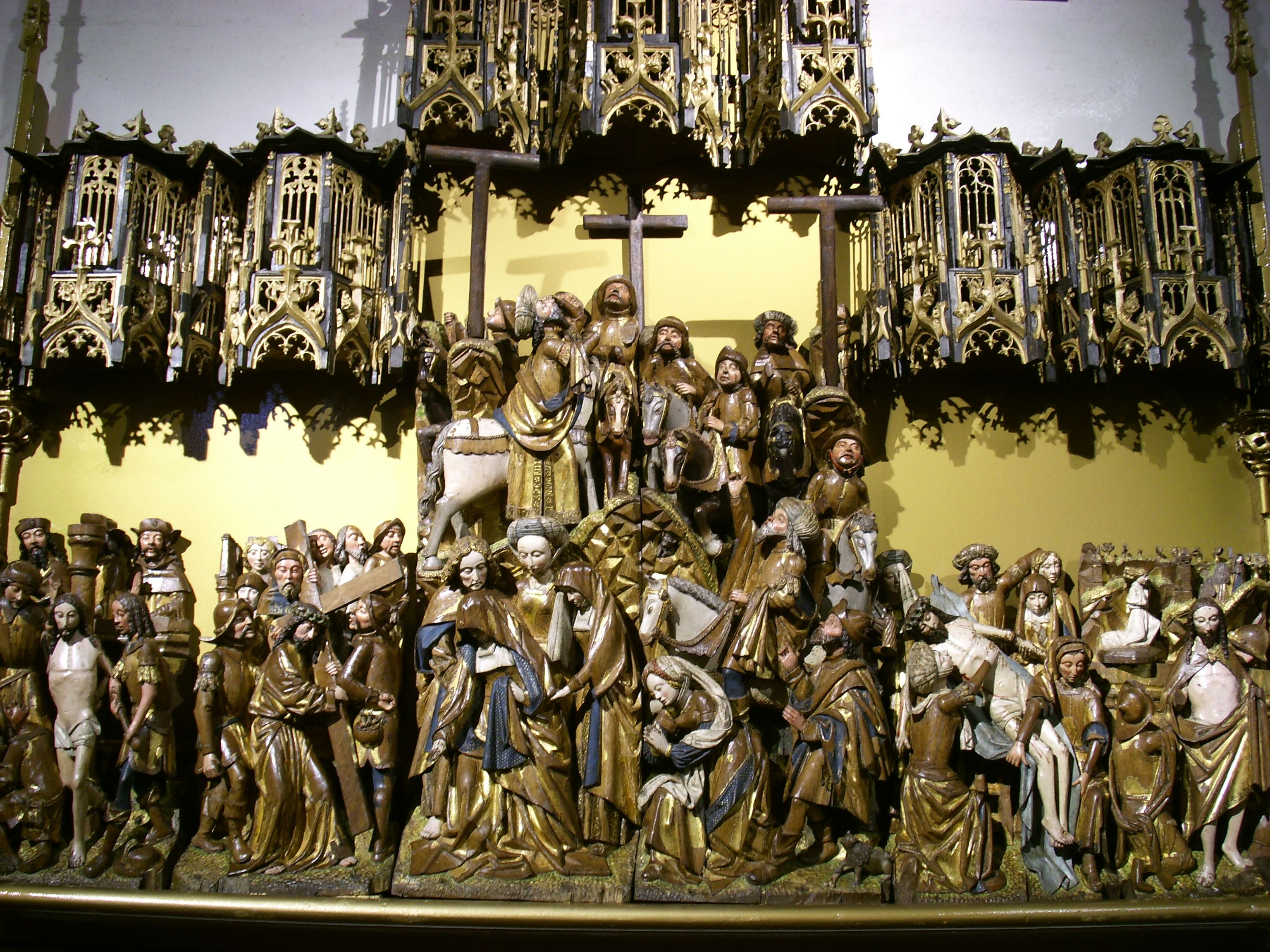 Retablo de la Pasión, tríptico hispano-flamenco de entre 1495 y 1500, en la Capilla Santa de la Basílica de la Asunción de Nuestra Señora de Lequeitio, Vizcaya, País Vasco, España